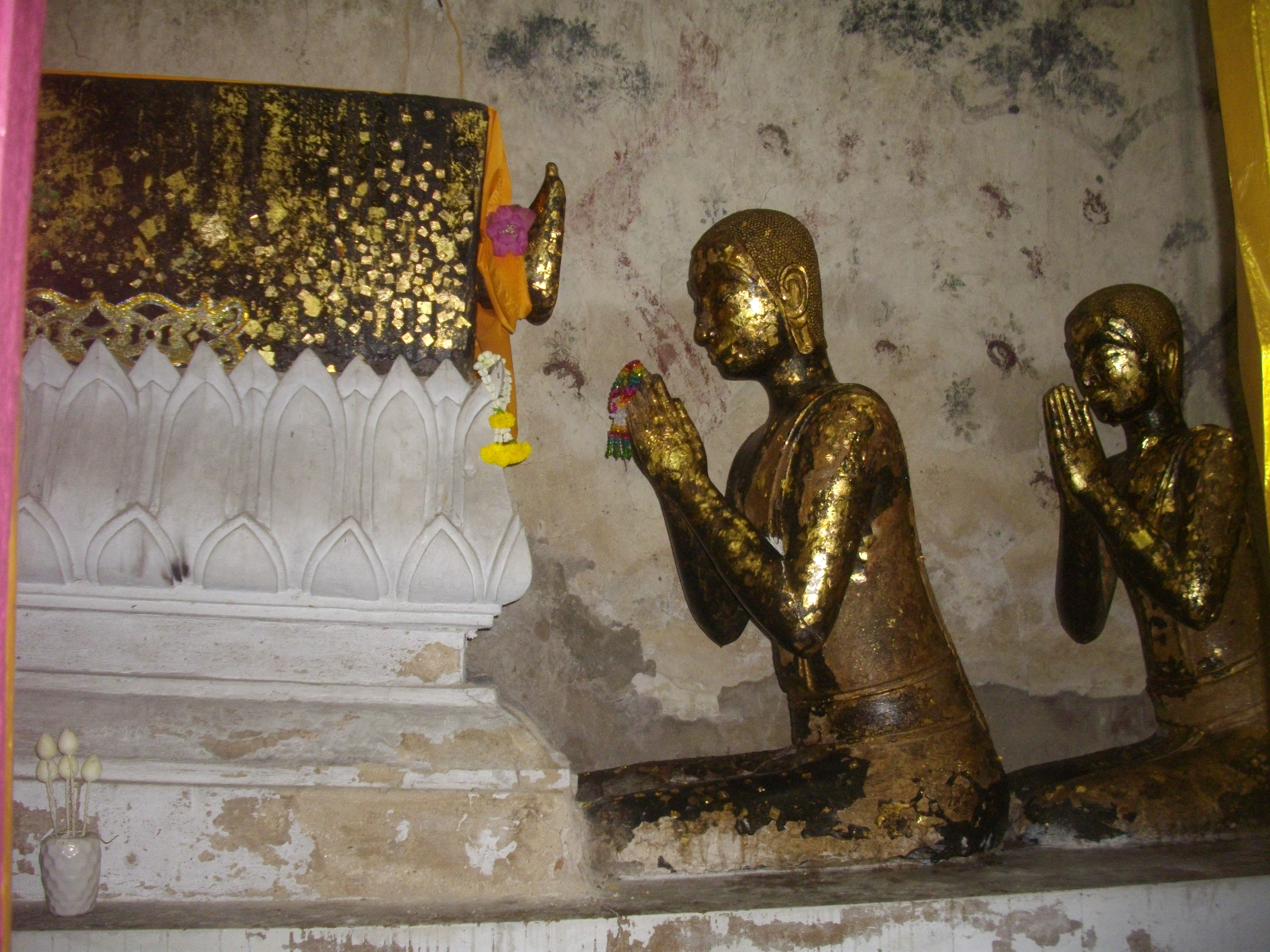 ประติมากรรมพระมหากัสสปเถระกระทำอัญชลีต่อพระพุทธสรีระ ในวิหารพระพุทธรูปปางถวายพระเพลิงพระพุทธสรีระ หลังพระอุโบสถวัดอินทาราม (วัดบางยี่เรือนอก หรือวัดบางยี่เรือใต้) แขวงบางยี่เรือ เขตเทอดไทย กรุงเทพมหานคร